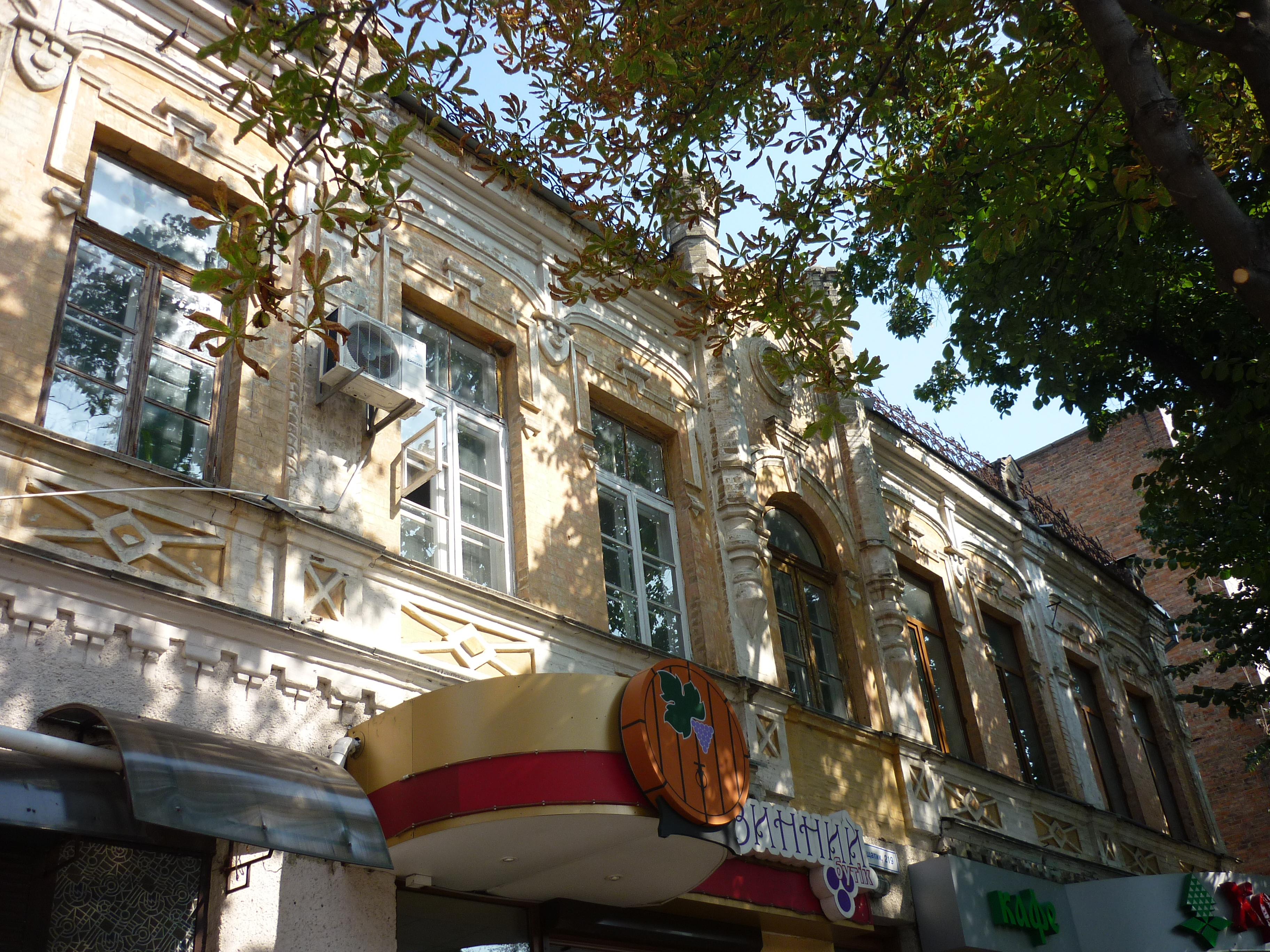 Будинок Белахова в Черкасах